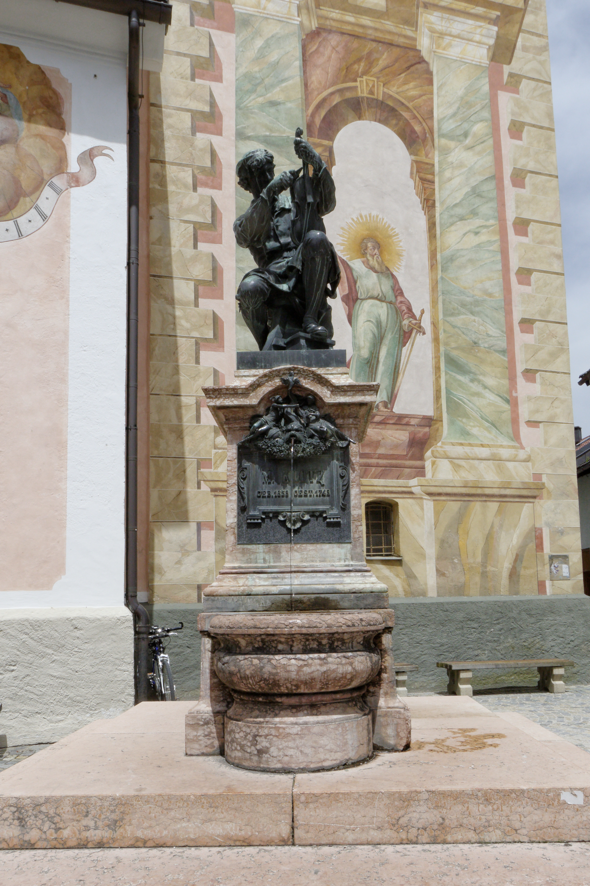 Mittenwald, Denkmal des Geigenbauers Matthias Klotz vor der St.Peter und Paul Kirche